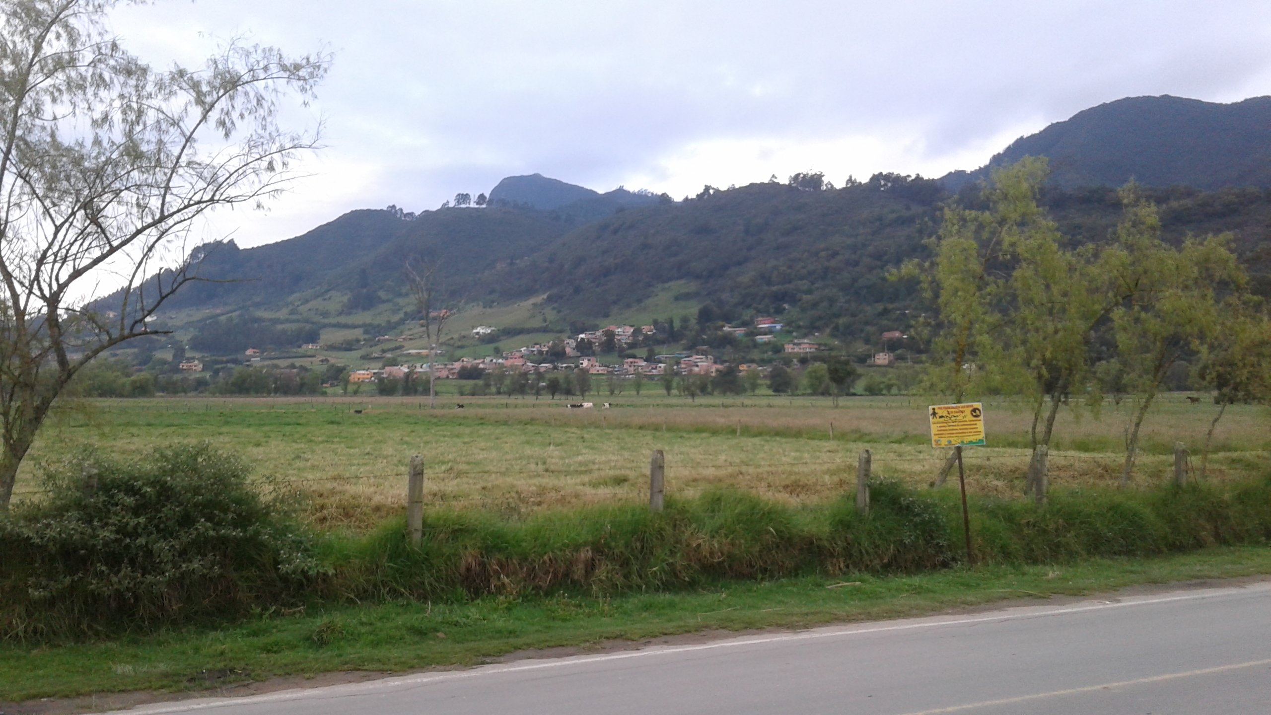 paisaje rural (Tabio, Cundinamarca, Colombia)